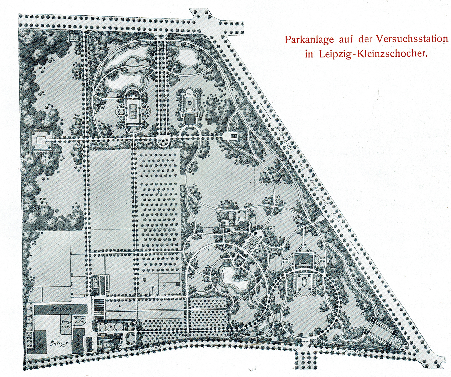 Rud. Sack. Leipzig-Plagwitz. 1863–1913. Lebensgeschichte des Begründers, Entwicklung und Stand des Werkes. Meisenbach Riffarth & Co., Leipzig 1913.